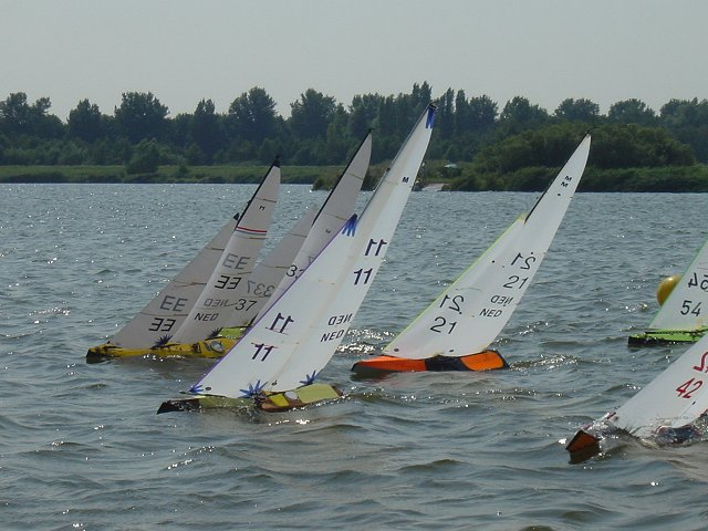 Een fraai veld met Marblehead's